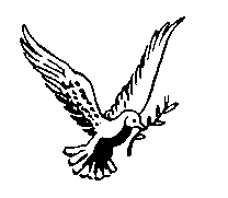 peace dove